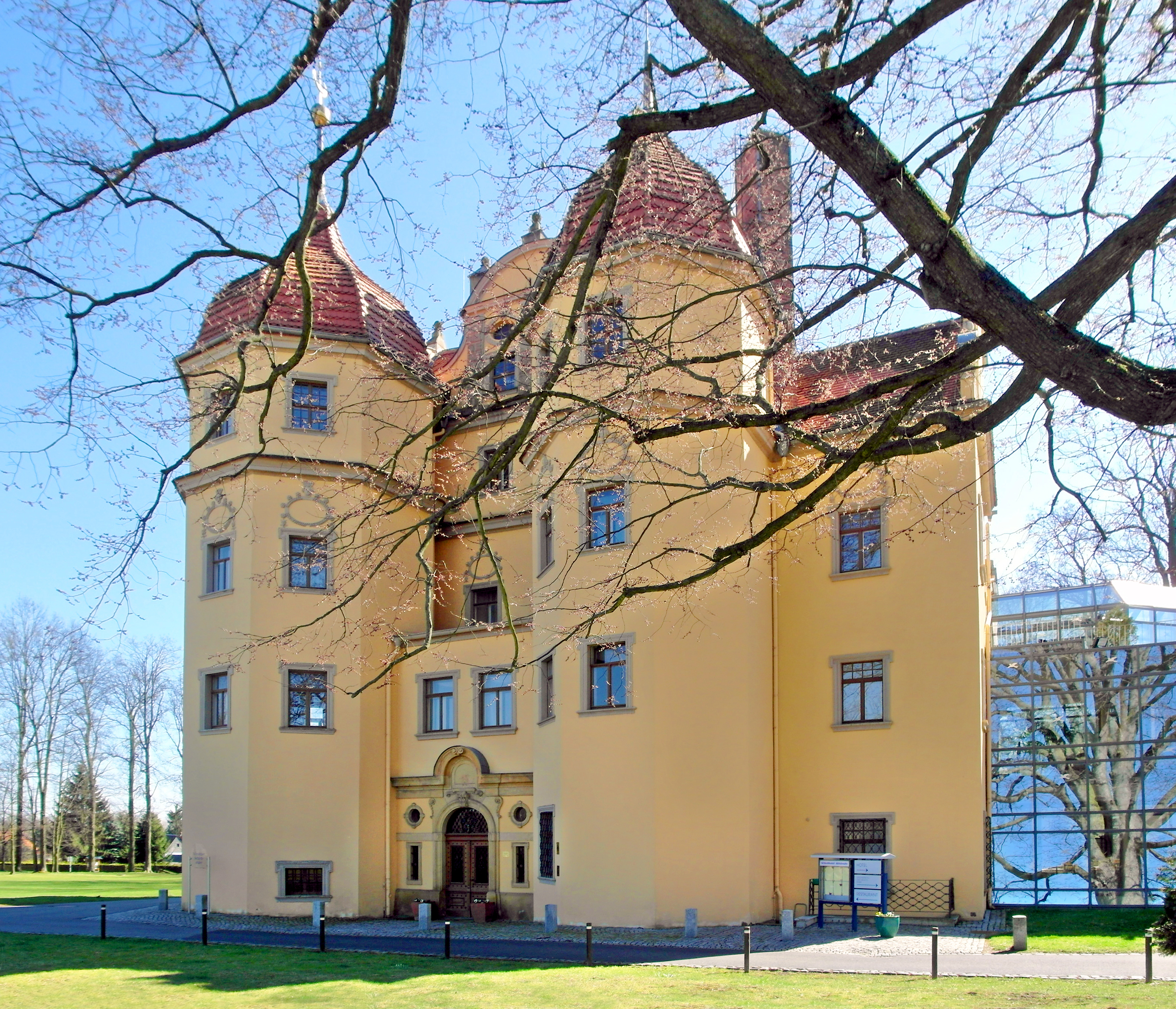 27.03.2017 02763 Hörnitz (Bertsdorf-Hörnitz) Zittauer Straße 9: Renaissanceschloß Alt-Hörnitz. Vom Meister Valentin aus Zittau 1651-1654 für den Zittauer Bürgermeister Dr. Christian von Hartig errichtet. In der DDR ab 1949 als Ferienheim der Gewerkschaft genutzt. Ab 1996 „Schlosshotel Althörnitz“ im Privatbesitz der Familie Rudolf von Sandersleben. Das neue Bettenhaus wurde in der ersten Hälfte der 1990er Jahre angebaut. Sicht von Norden. [SAM8948.JPG]20170327340DR.JPG(c)Blobelt